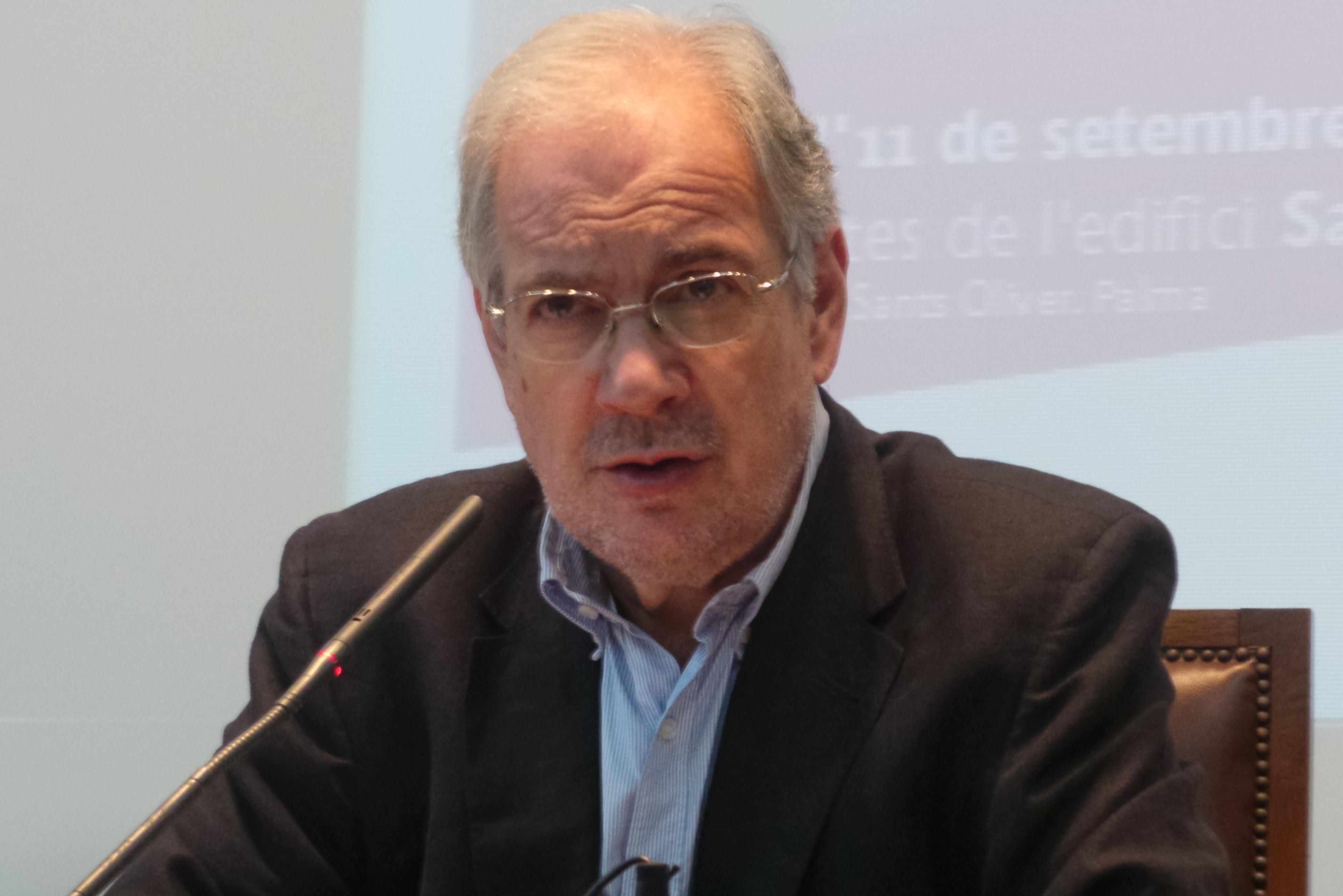 Intervención en la Universidad de Verano de Estudios de Género. UIB. Palma de Mallorca Septiembre 2015